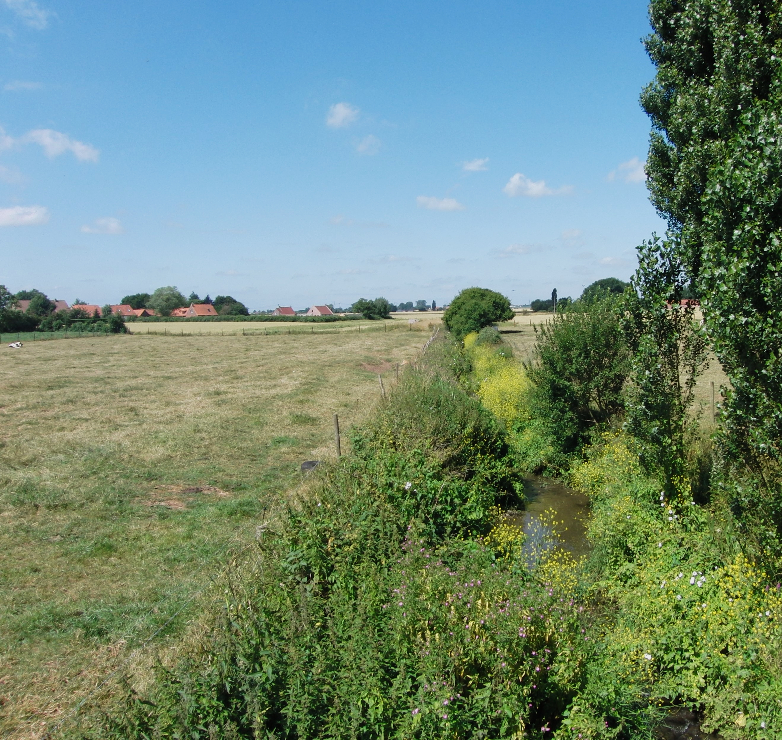 Watringue à Noordpeene dans la Réserve naturelle régionale des prairies du Schoubrouck.- Nord-Pas-de-Calais.- France.